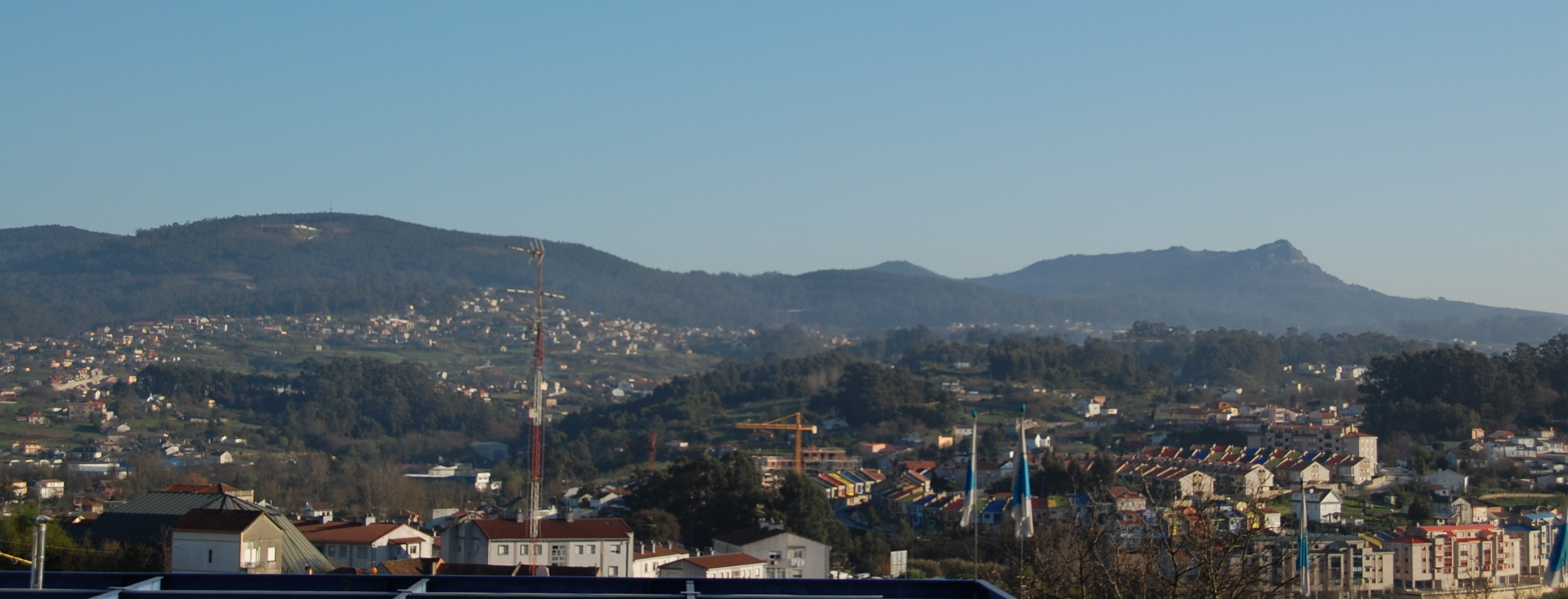 Vista da zona da Salgueira e, mais ao fundo, Sárdoma e a Laxe, na cidade de Vigo.